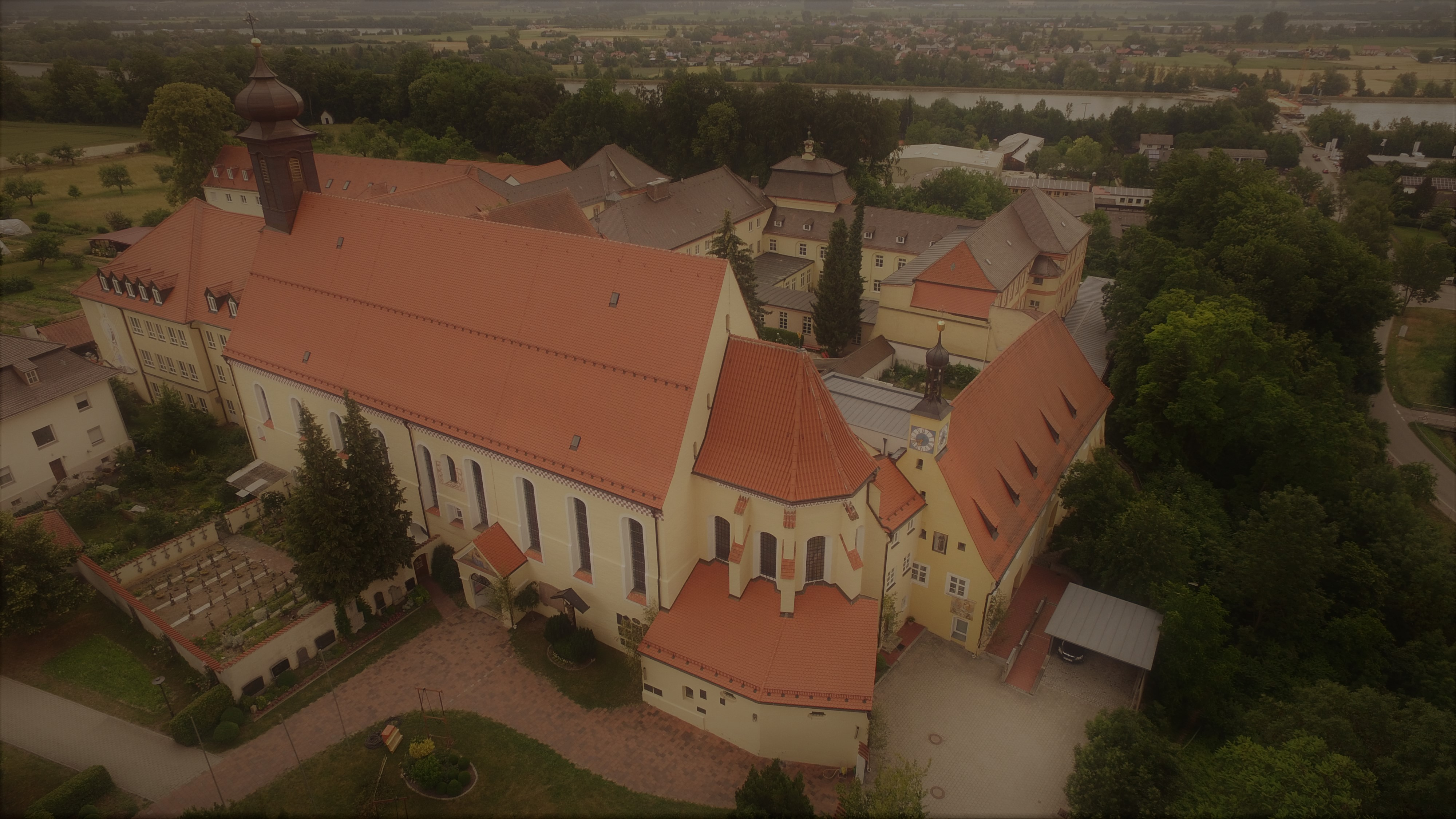 Im Vordergrund die Pfarrkirche aus der Luft mit der angrenzenden Klosterkirche im "Hintergrund"